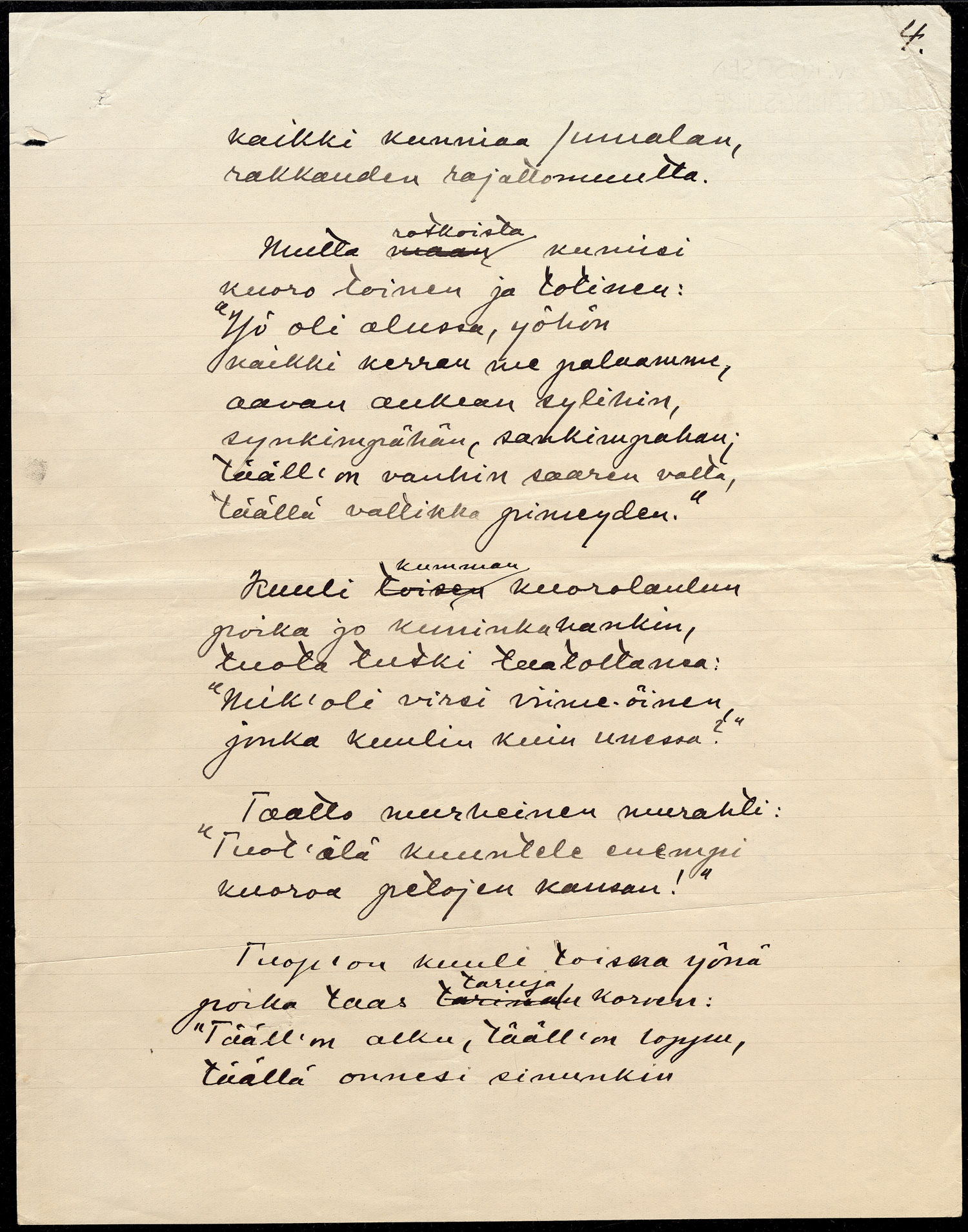 Osa Eino Leinon käsikirjoituksesta Helkavirsiä II sarjan runoon Mennyt manner